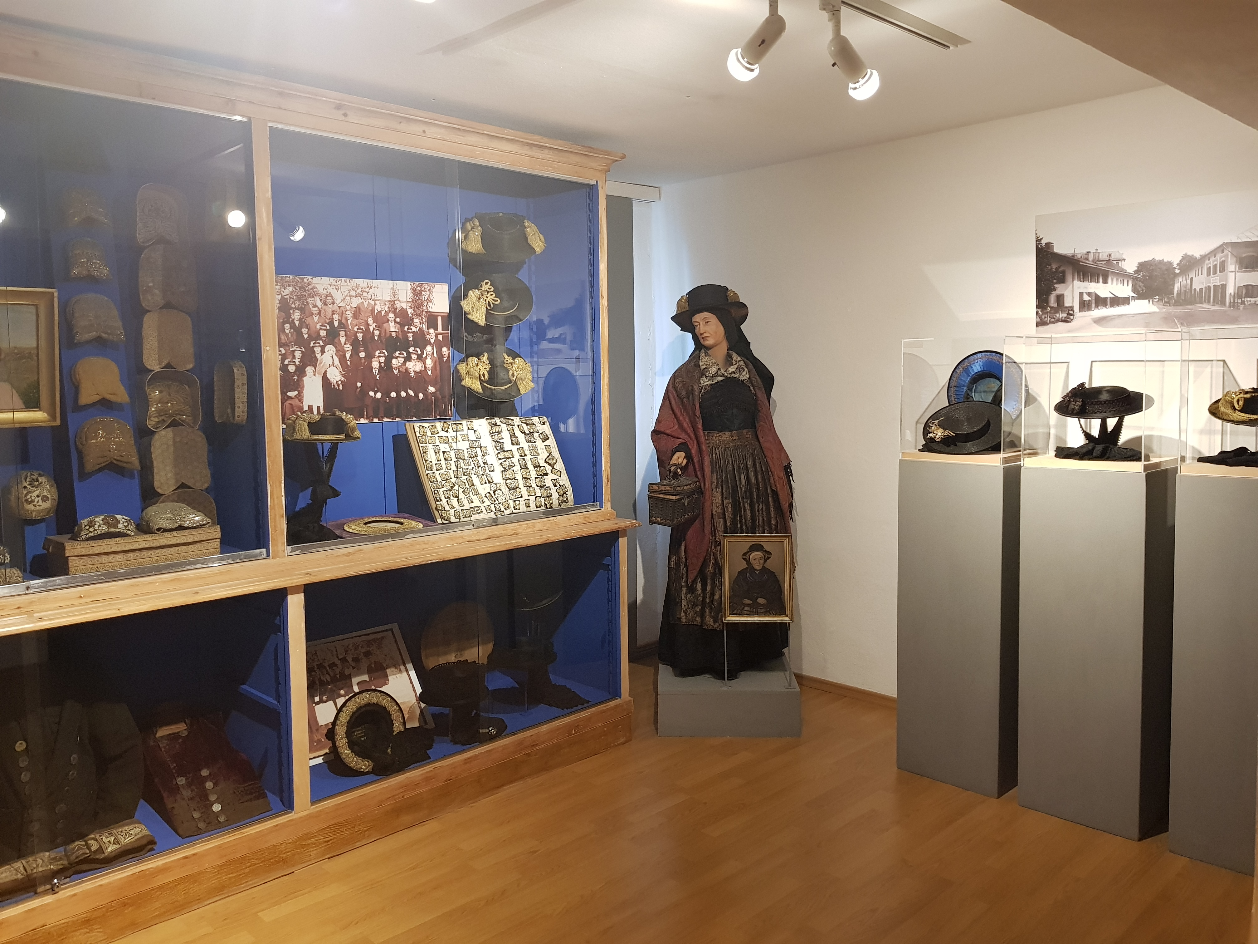 Ausstellungsraum zum Priener Hut und Trachtengeschichte im Heimatmuseum Prien